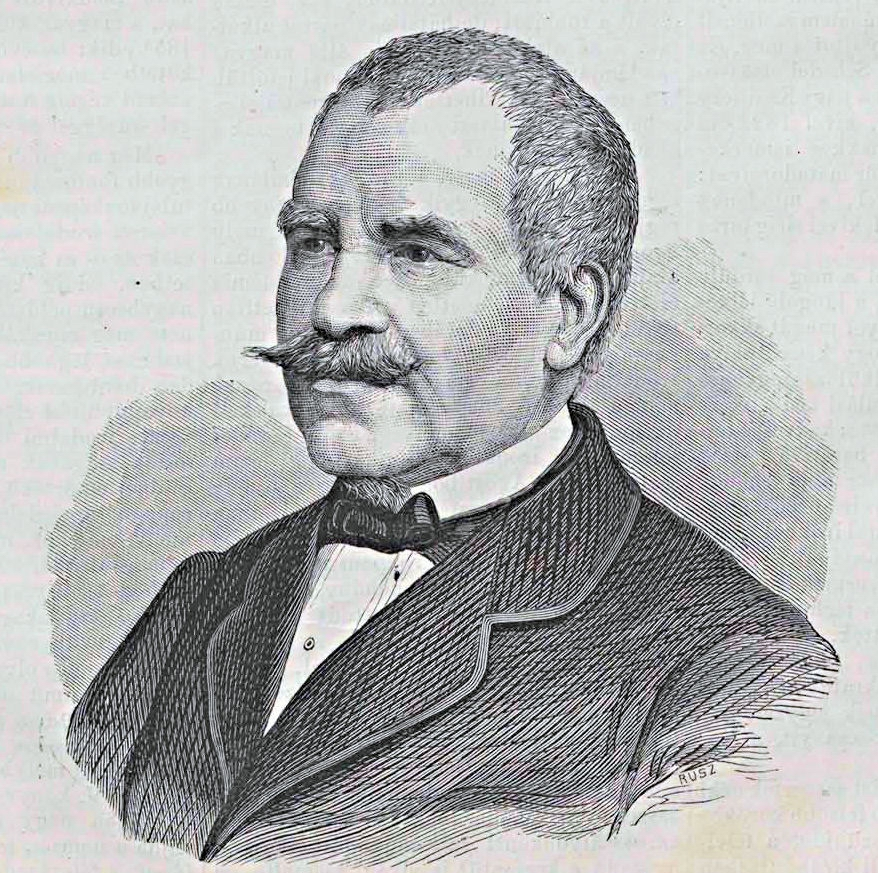 Toldy Ferenc (1805–1875) irodalomtörténész, egyetemi tanár, akadémikus és a Kisfaludy Társaság elnöke. Rusz Károly metszete (Vasárnapi Ujság, 1871. november 12.)